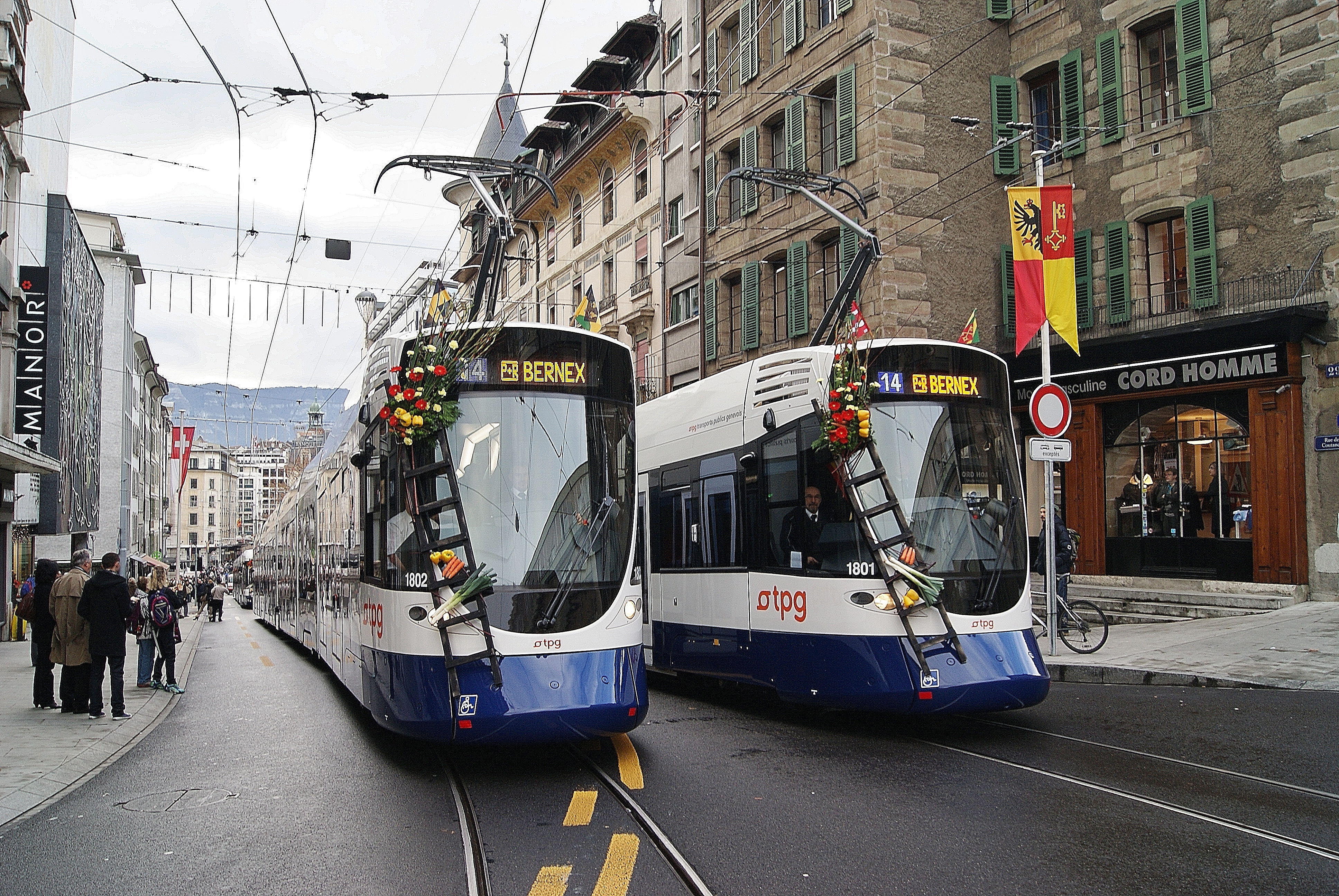 Photo. Trams aux Fils. Rue de Coutance Trams 1801 et 1802 (Tango de Stalder) circulent en parallèle lors du cortège inaugural de la nouvelle ligne 14 (Bernex, Meyrin- Gravières ou Cern) en passant par la place Bel-Air et la Gare Cornavin. Je trouve que ce tram est un bon véhicule, avec un très bon roulement, il est confortable et silencieux avec un beau desing, seul problème il n'est pas à plancher bas sur toute sa longueur, mais seulement à 70%.